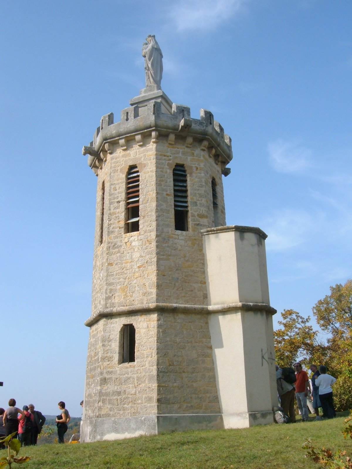 Sermizelles (Yonne) : tour Malakoff et Notre Dame d'Orient